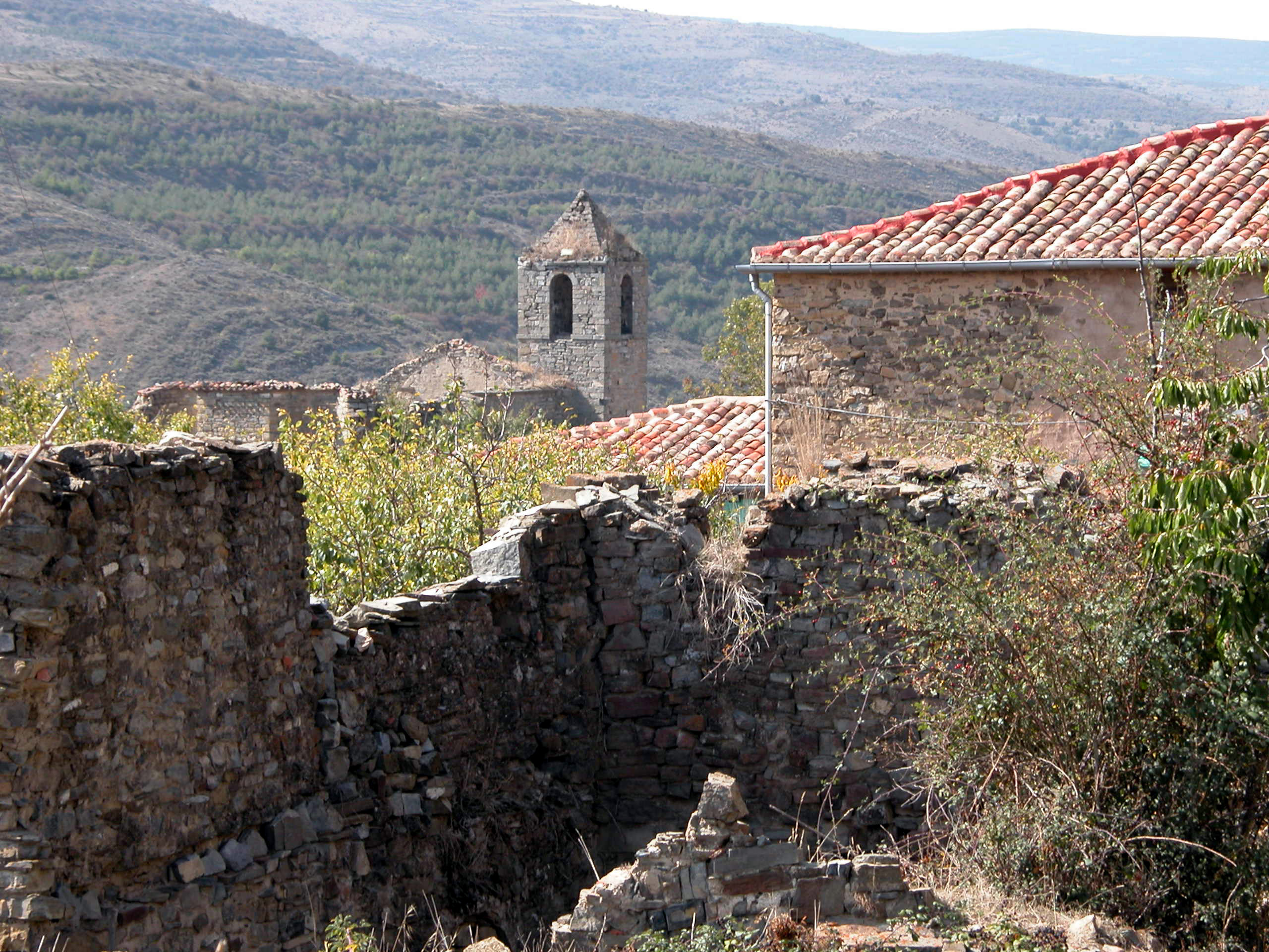 Navalsaz, iglesia de Santiago. Aldea de Enciso, La Rioja - España.